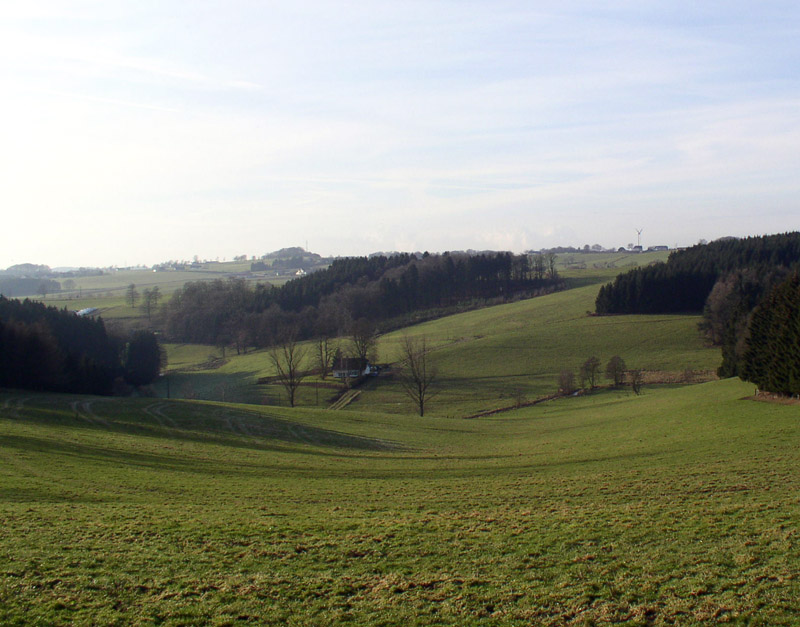 Hönderbruch, Radevormwald, 2004 selbst fotografiert, GFDL